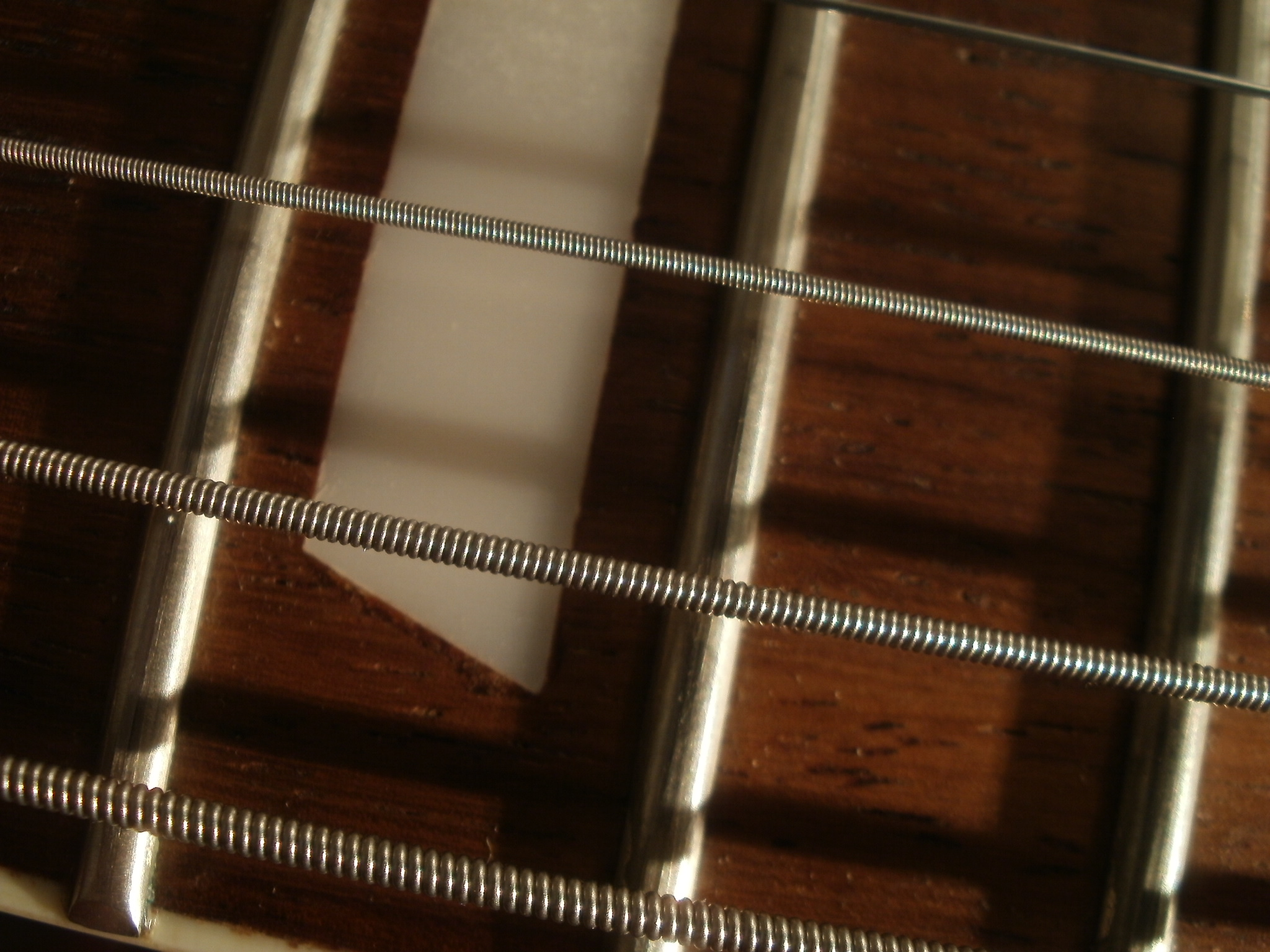 Витые струны